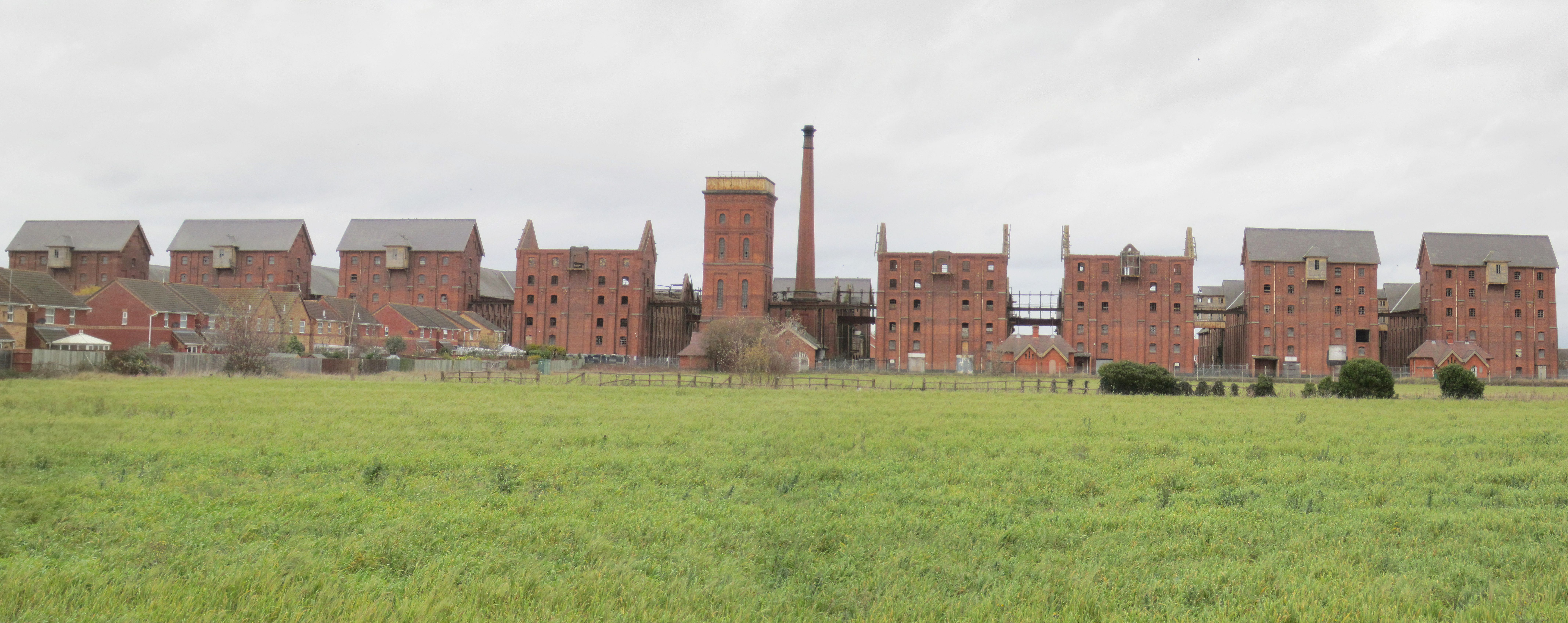 vervallen oude silo's tbv agrarische industrie bij Sleaford